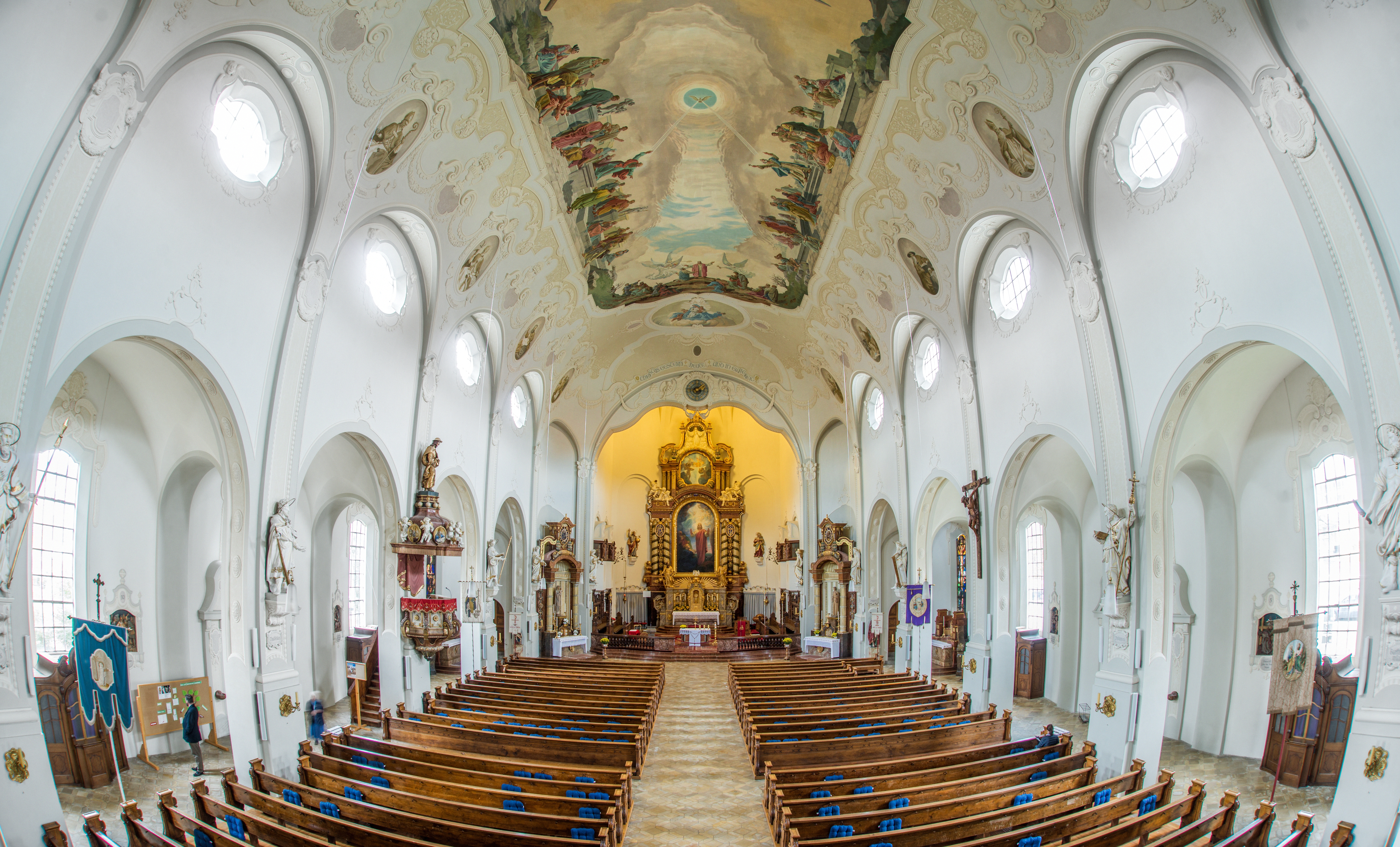 Katholische Stadtpfarrkirche St. Peter und Paul in Lindenberg im Allgäu (Bayern, Deutschland)This is a photograph of an architectural monument.